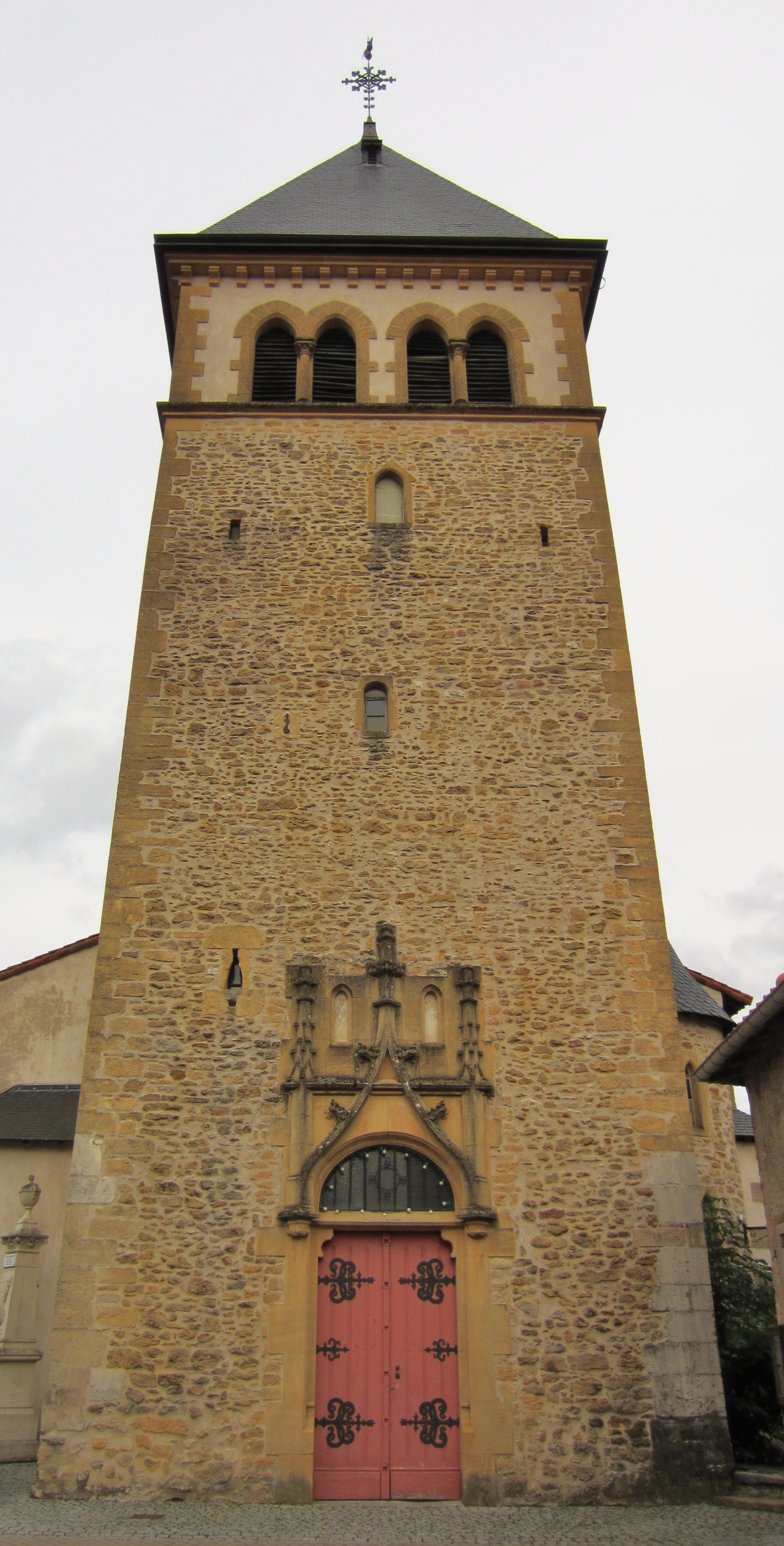 Description eglise saint-rémi Vaux Date7 September 2011Sourcemon appareil photoAuthorAimelaimePermission (Reusing this file) eglise saint-rémi Vaux